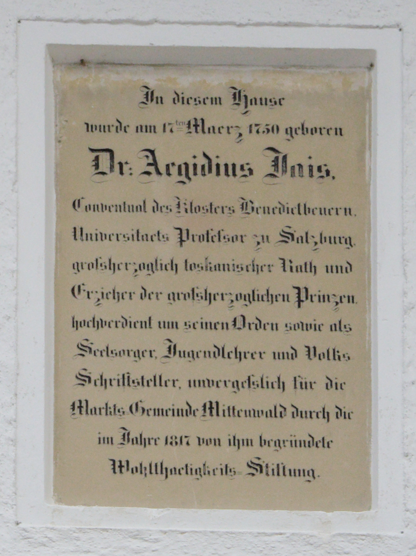 Mittenwald, Jaisweg 16; Steinerne Gedächtnistafel für Dr. Aegidius Jais; Originaltext: "In diesem Hause wurde am 17ten Maerz, 1750 geboren Dr. Aegidius Jais, Conventual des Klosters Benedictbeuern. Universitaets Profehsor zu Salzburg, grohsherzoglicher toskanischer Rath und Erzieher der grohsherzoglichen Prinzen, hochverdient um seinen Orden sowie als Seelsorger, Jugendlehrer und Voks Schriftsteller, unvergehslich für die Markts Gemeinde Mittenwald durch die im Jahre 1817 von ihm begründete Wohlthaetigkeits-Stiftung."